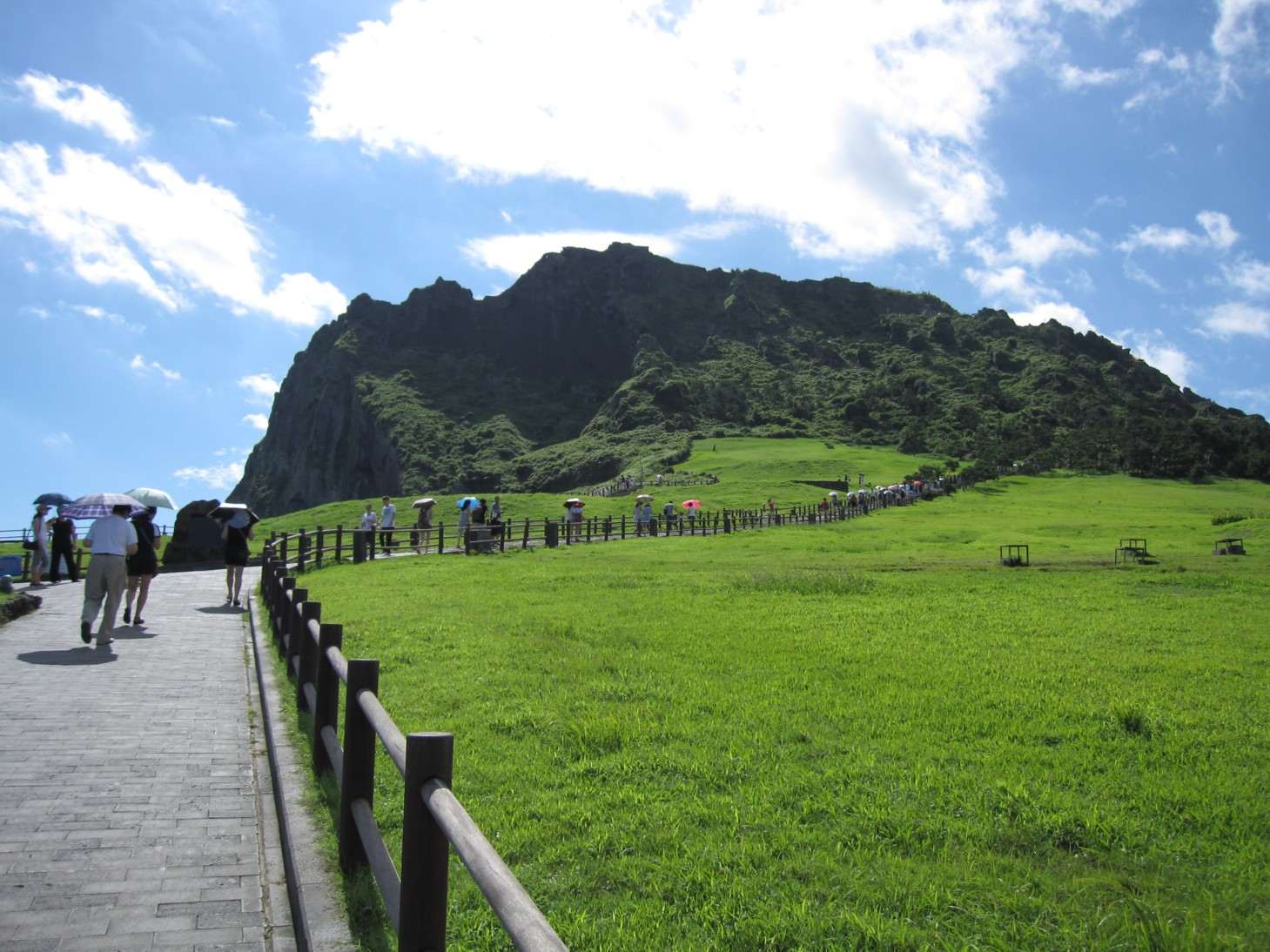 siehe [1]